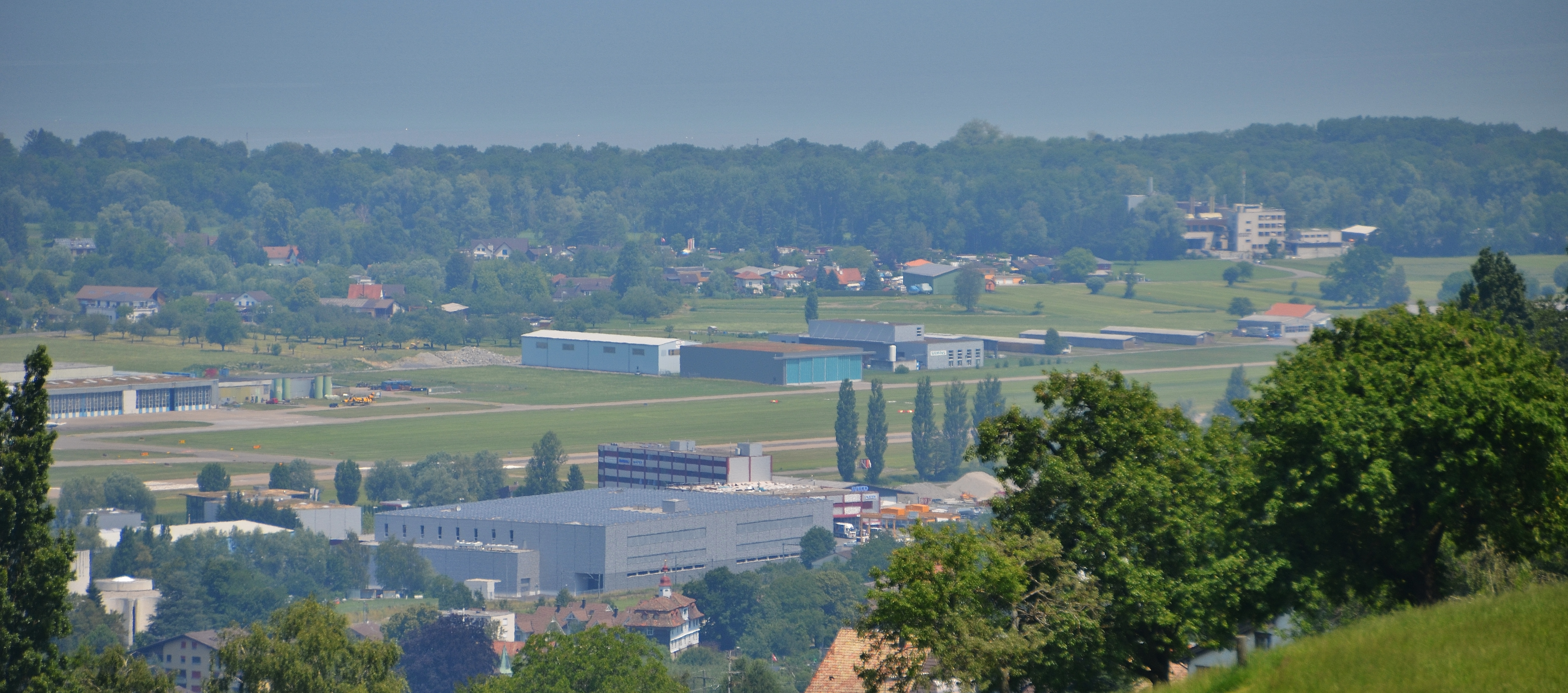 Blick zum Flugplatz Sankt Gallen-Altenrhein, IATA: ACH